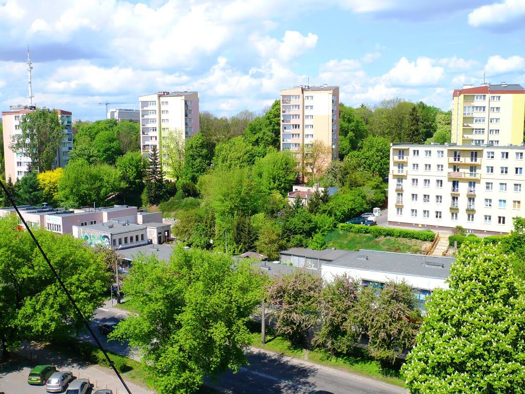 Wieżowce przy ulicy Głębokiej widok z budynku mieszkalnego "Pekin" (widok z 2012r.)